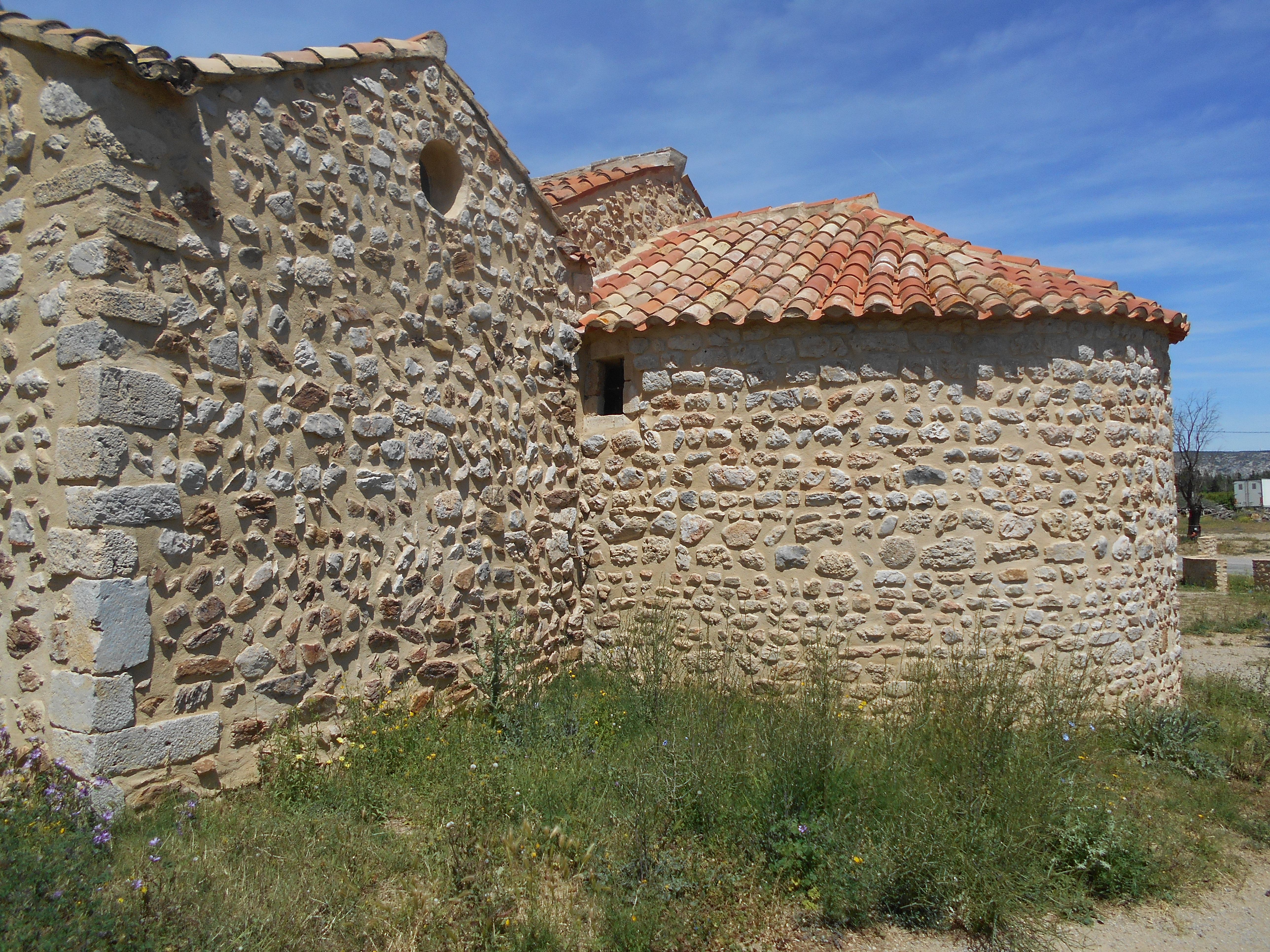 Santa Cecília de Garrius. Absis principal